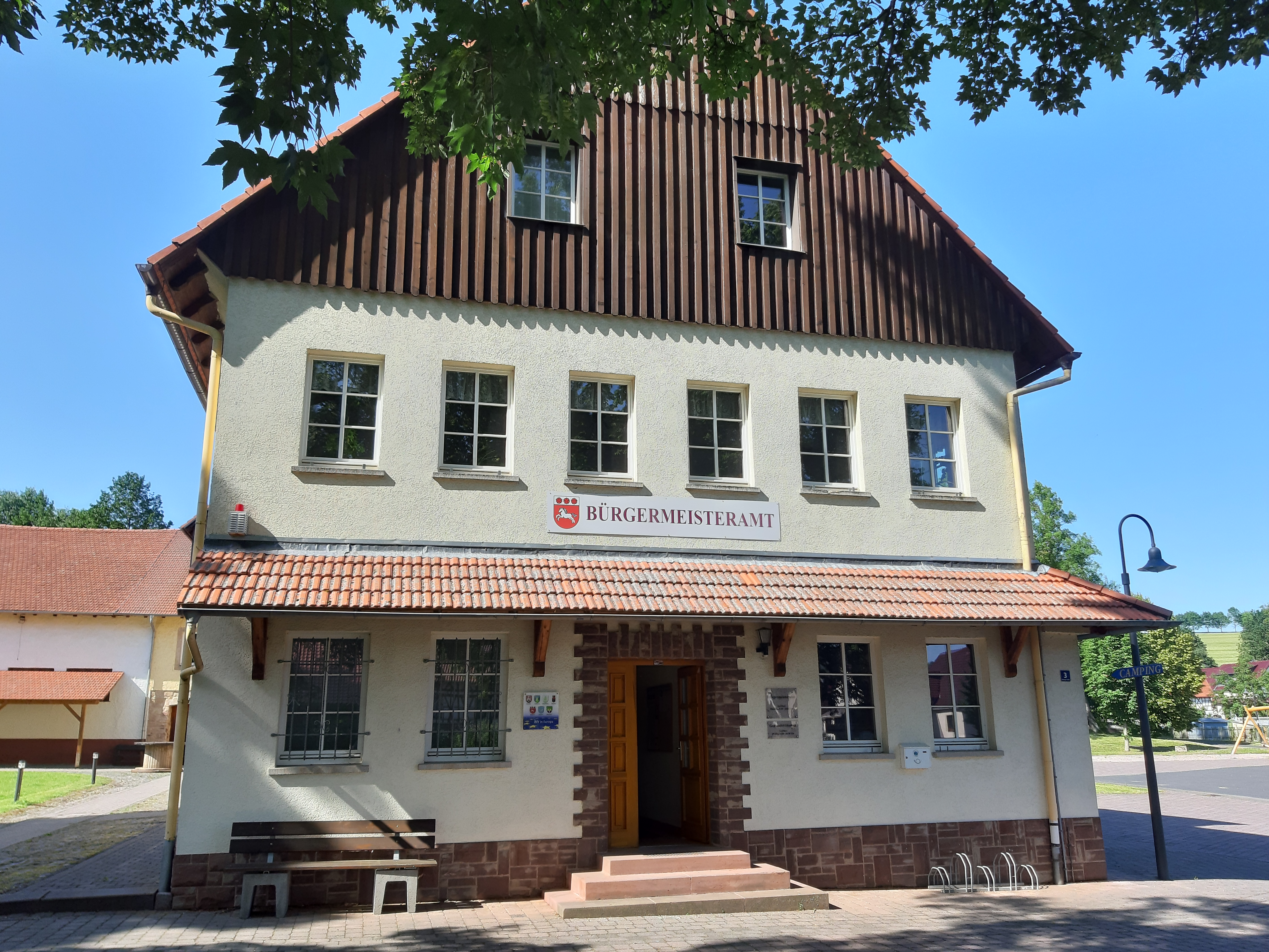 Roßdorf, Thüringen, Bürgermeisteramt